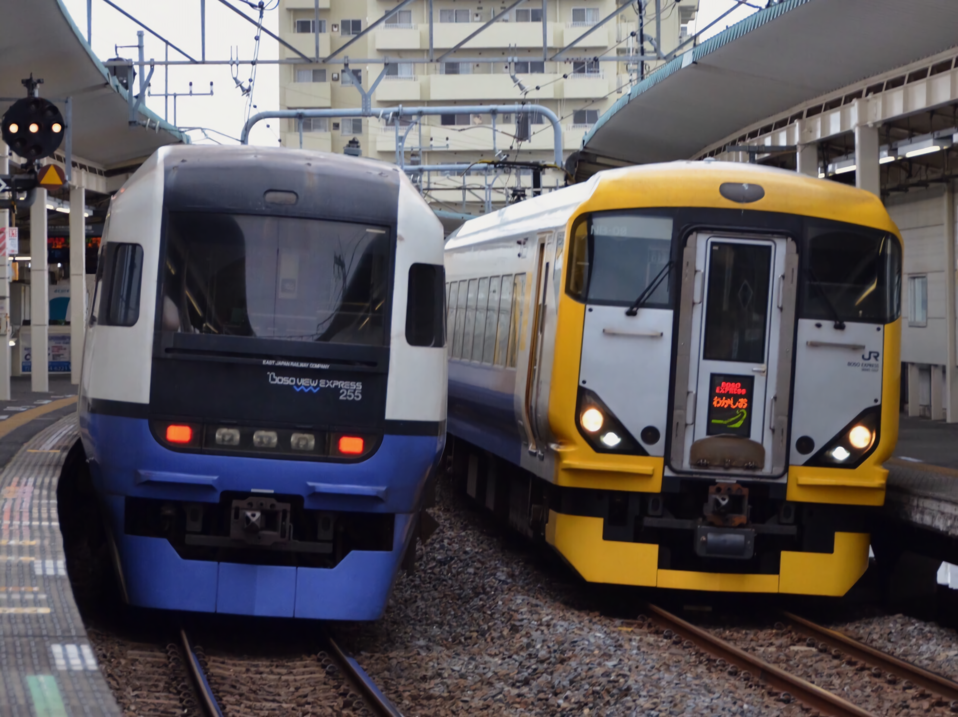 大網駅での外房線特急わかしお号 E257系 255系の並び